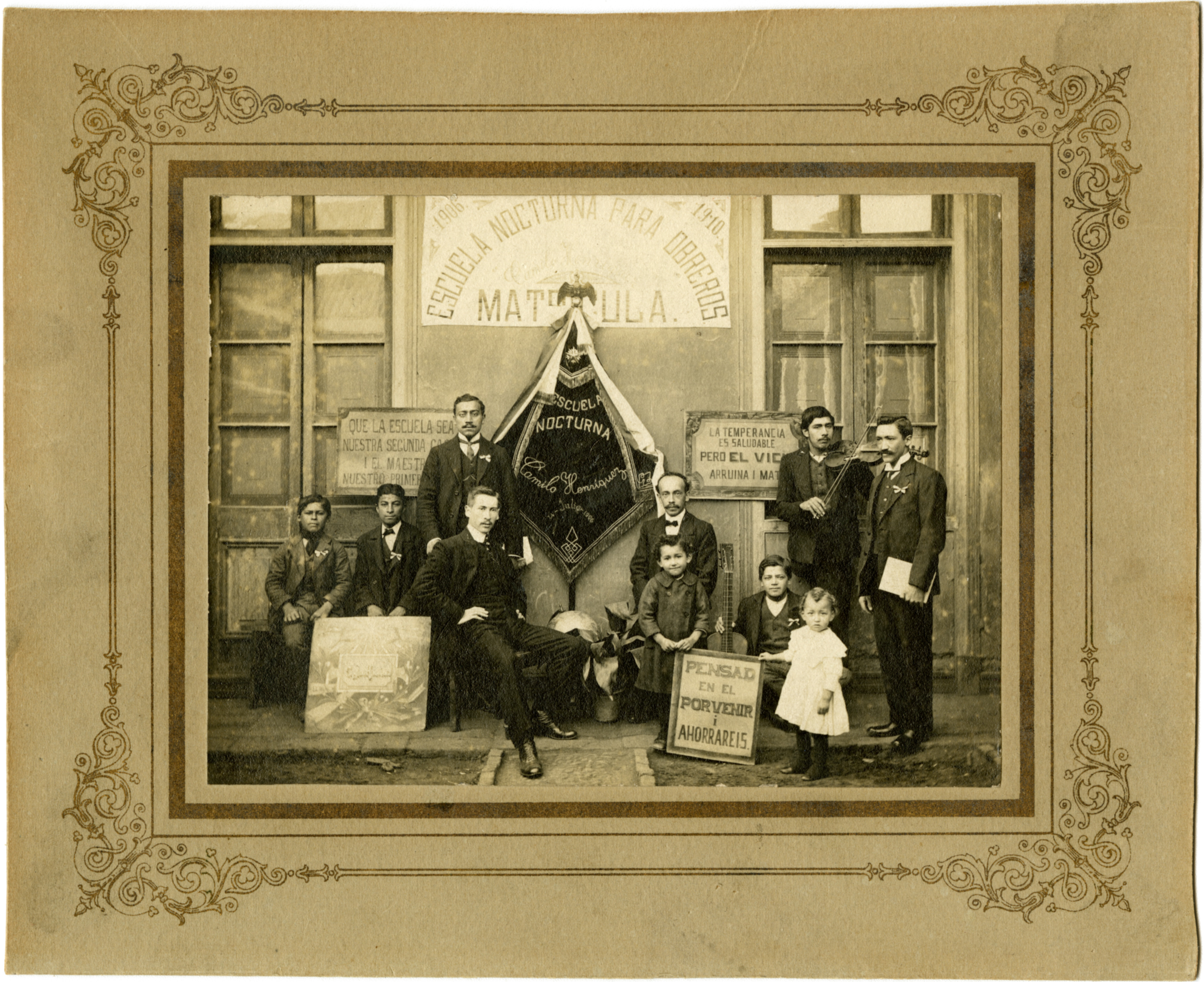 El director del establecimiento, Manuel Mandujano, junto a un grupo de profesores y alumnos. También se encuentran sus hijos Manuel y Luis Mandujano Navarro. La familia vivía en una casa interior.